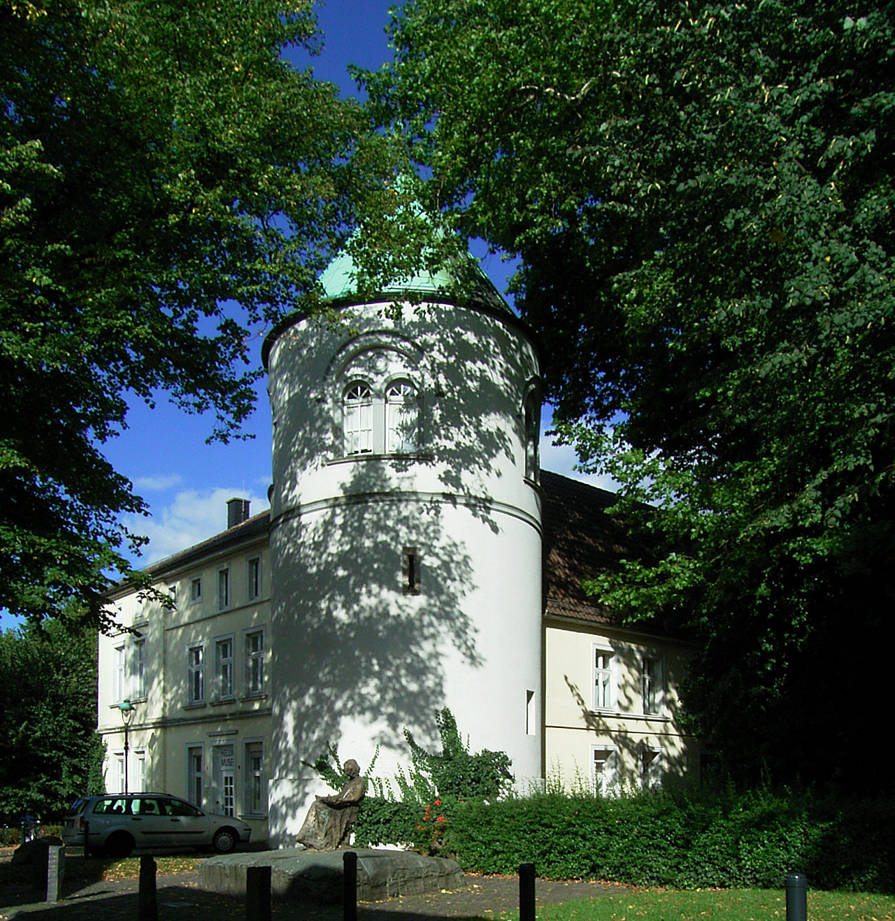 Das Hellweg-Museum in Unna, Nordrhein-Westfalen